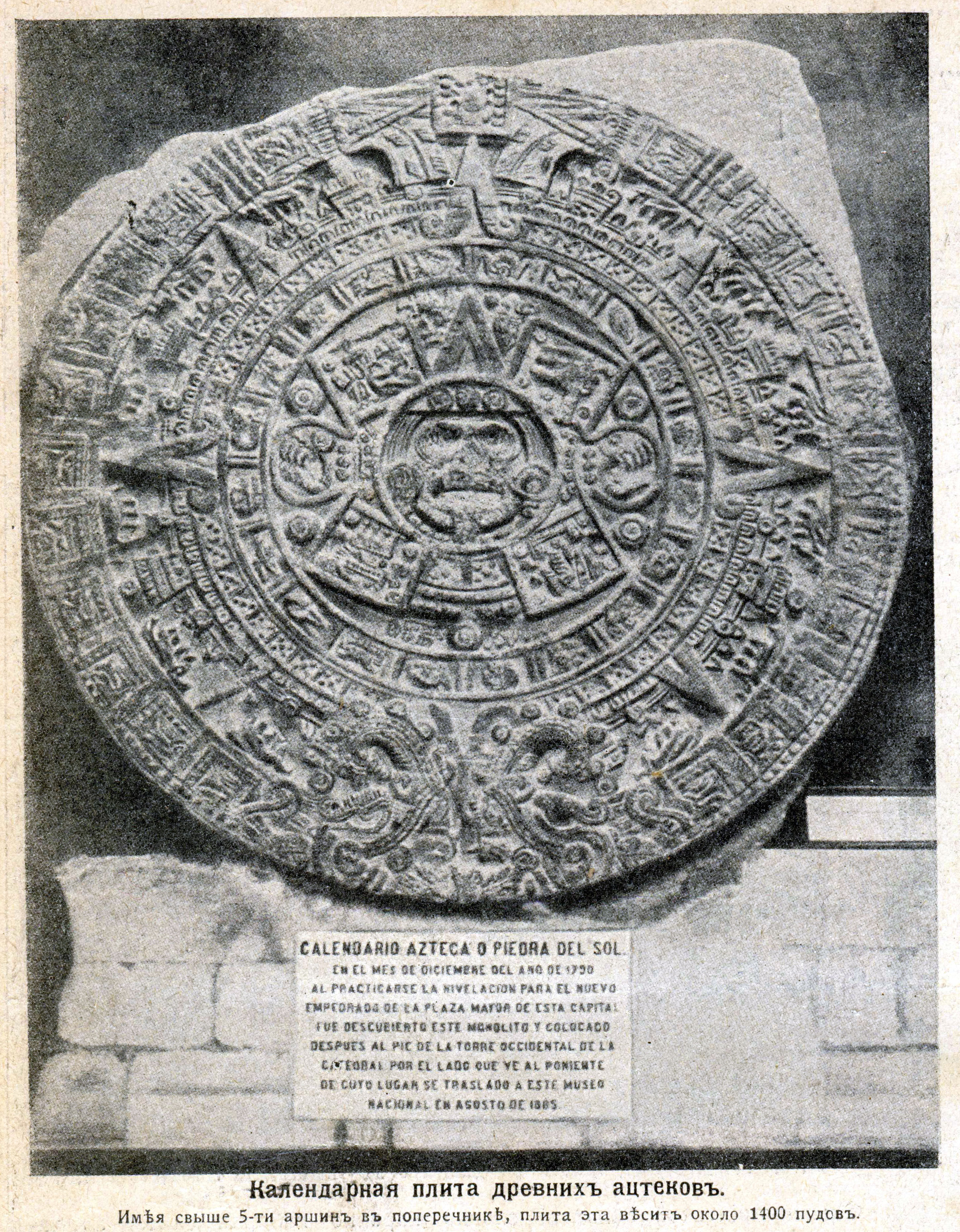 Piedra del Sol (conocido como Calendario Azteca) - Pierre du soleil, (connaissance come Calendrier Azteca). Russian Empire magazine "Nature and People", 1915.